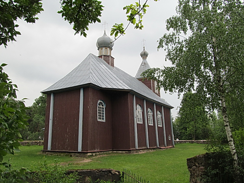 Вострава. Царква Міхала Арханёла